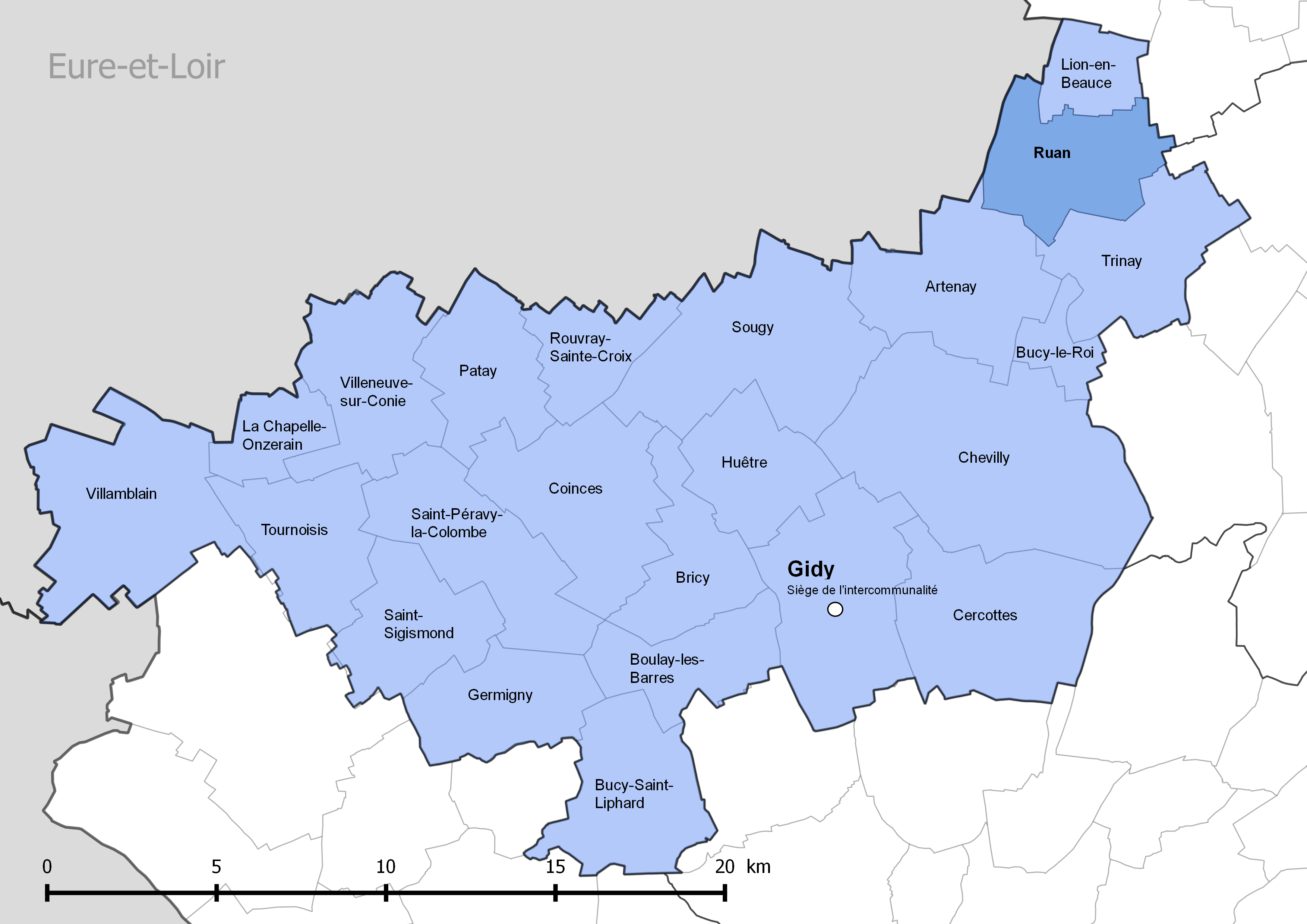 Périmètre de la communauté de communes de la Beauce loirétaine - Situation de la commune de Ruan